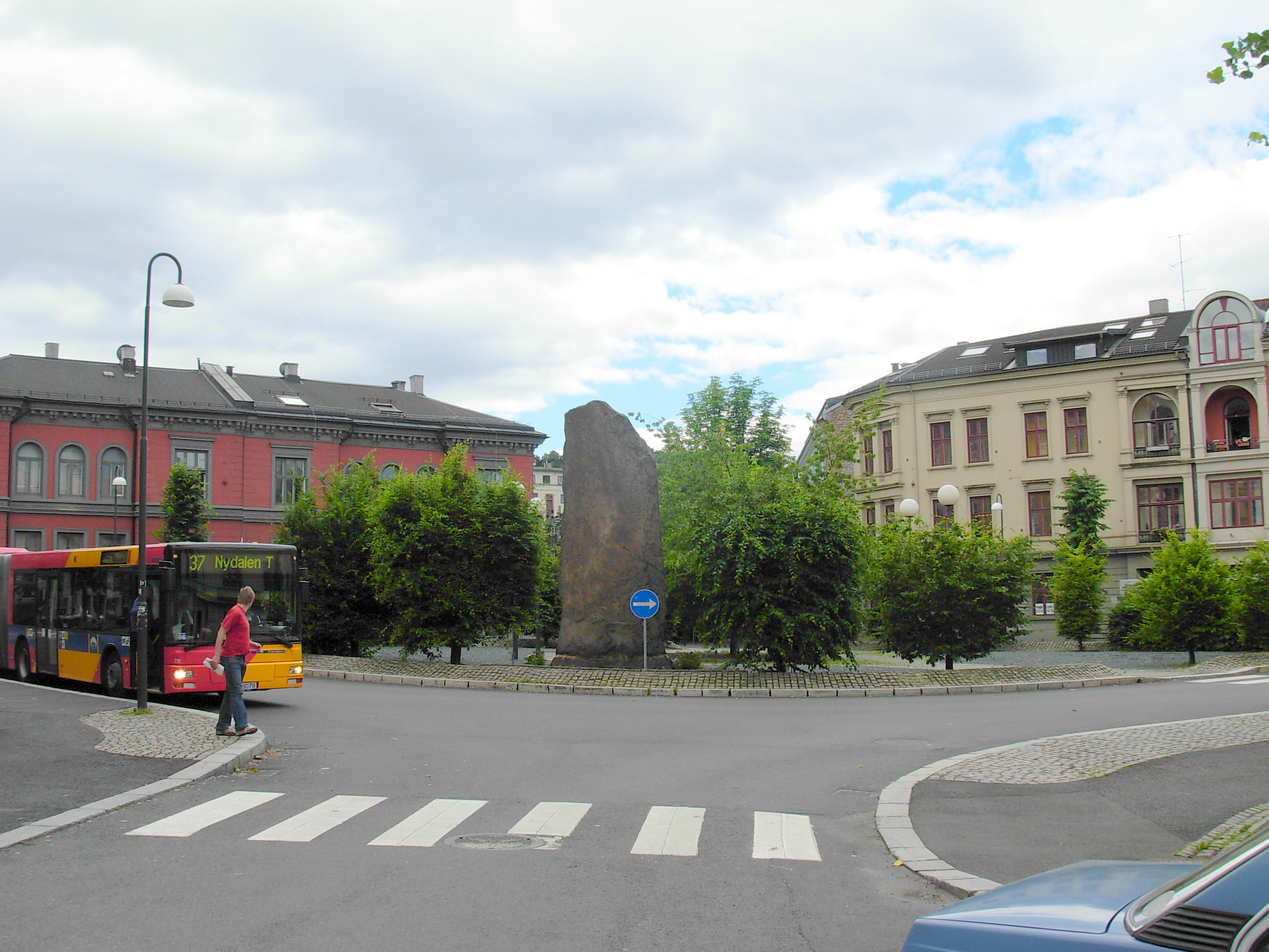 Harald Hardrådes plass, Gamlebyen, Oslo